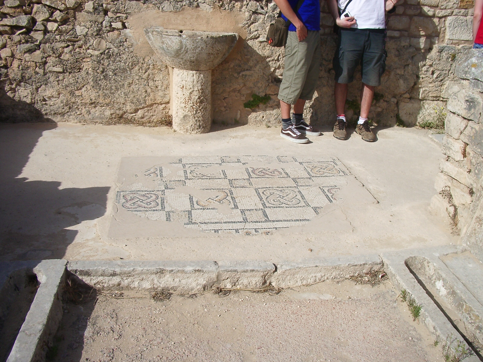 Dougga banys